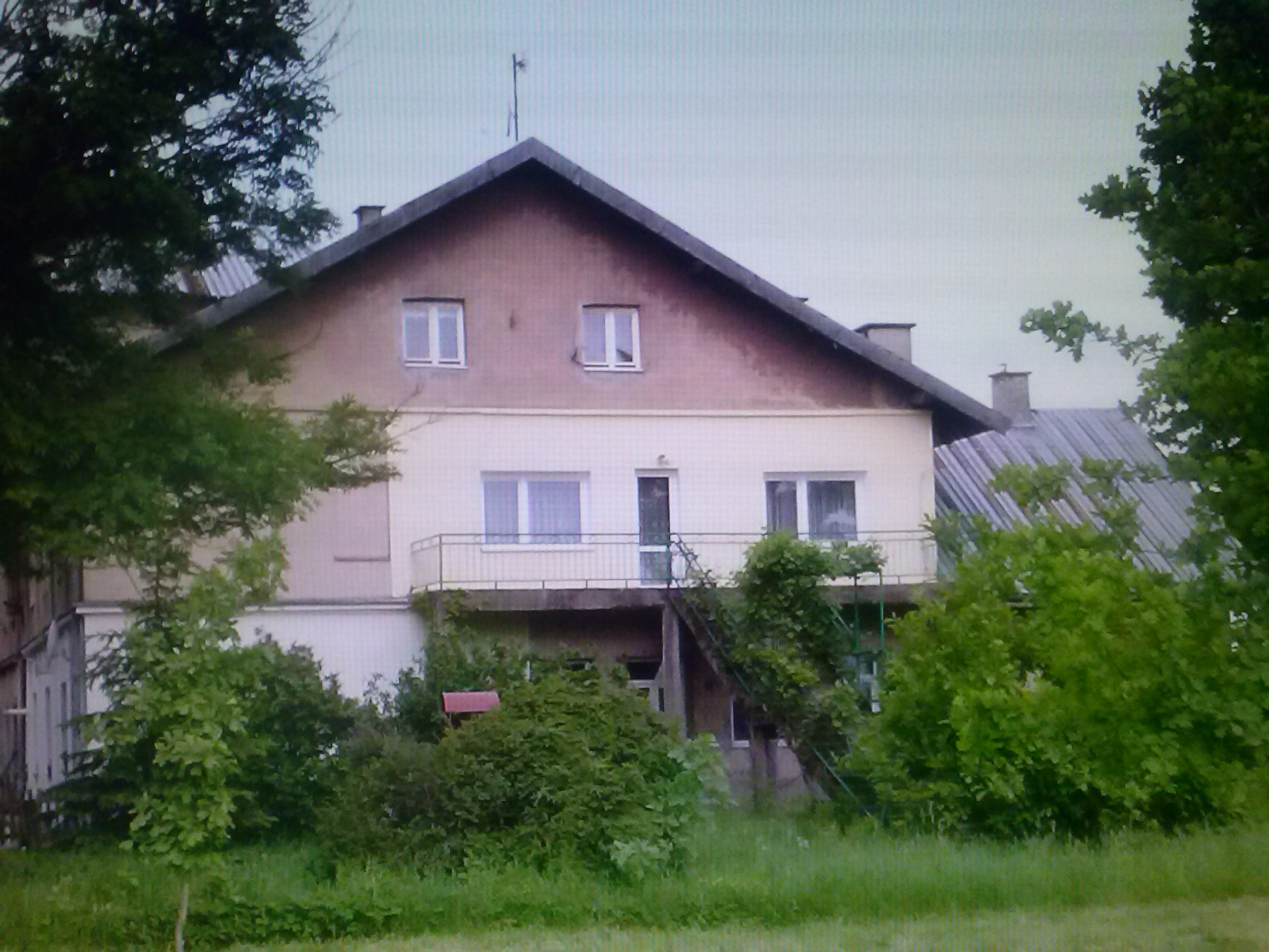 Dwór szlachecki w Tryńczy